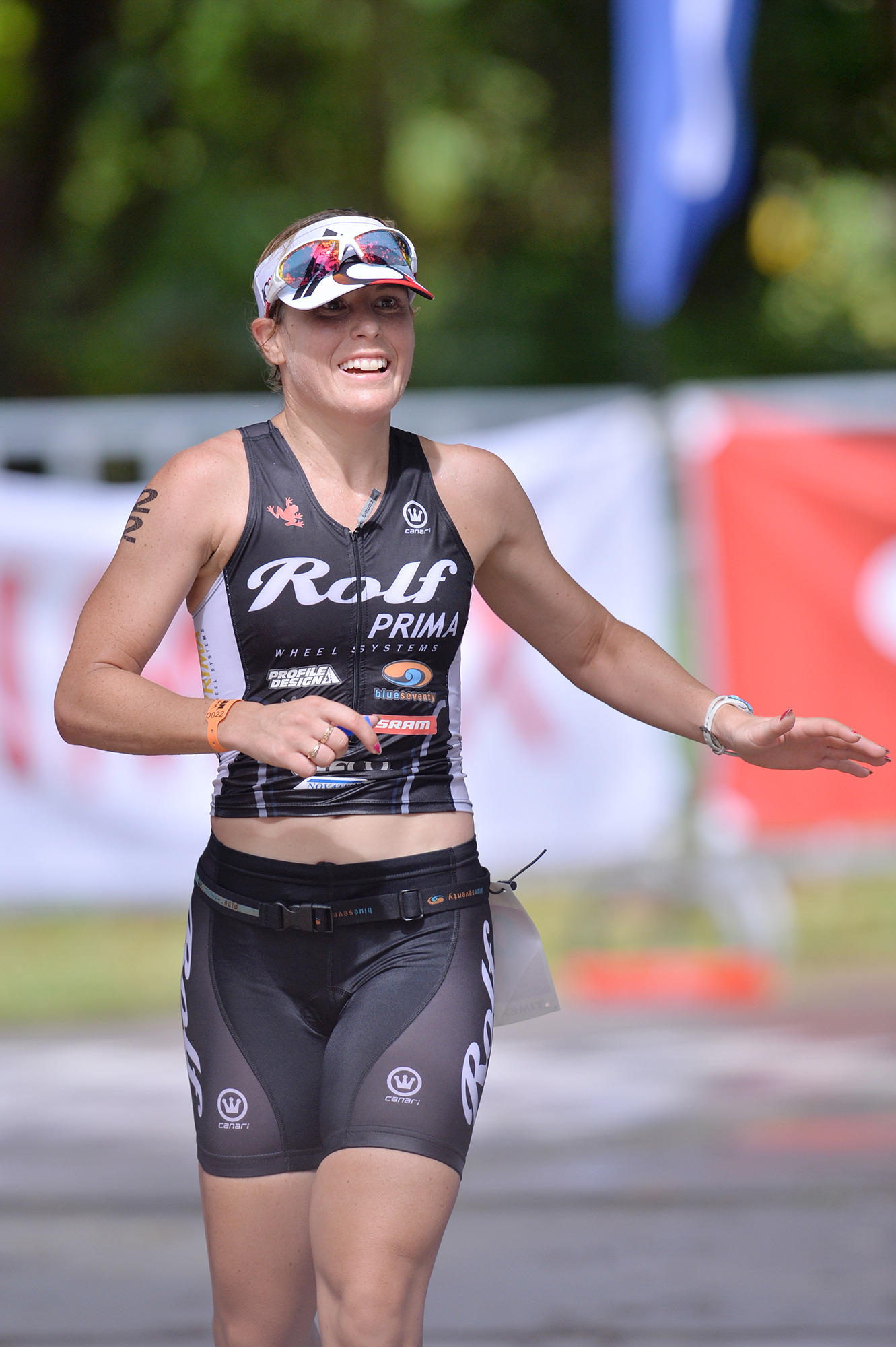 Kate Bevilaqua runner-up at 2013 Ironman 70.3 Taiwan